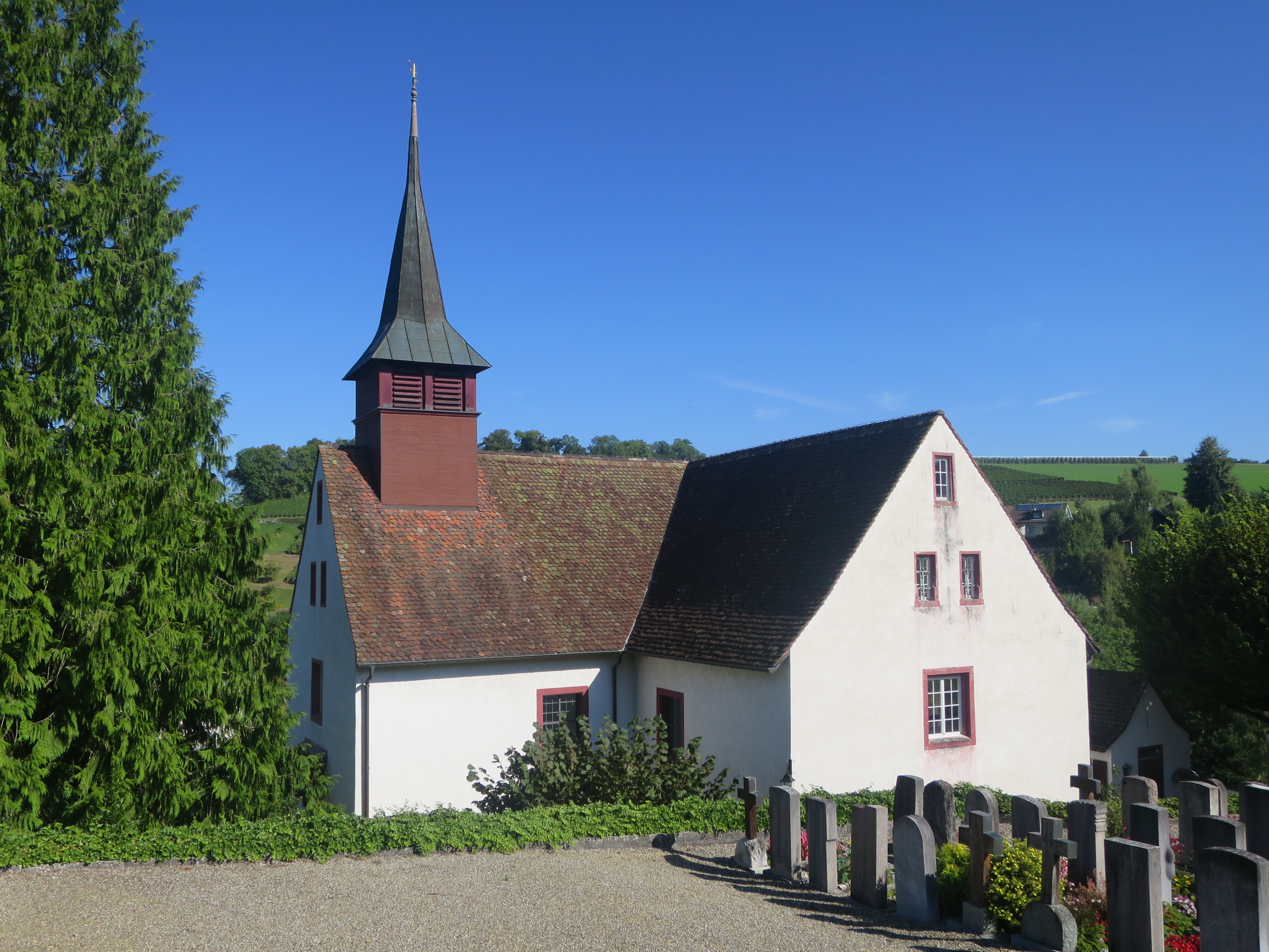 Reformierte Kirche Wintersingen, Schweiz, aussen